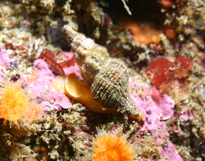 This snail is likely Fusinus monksae